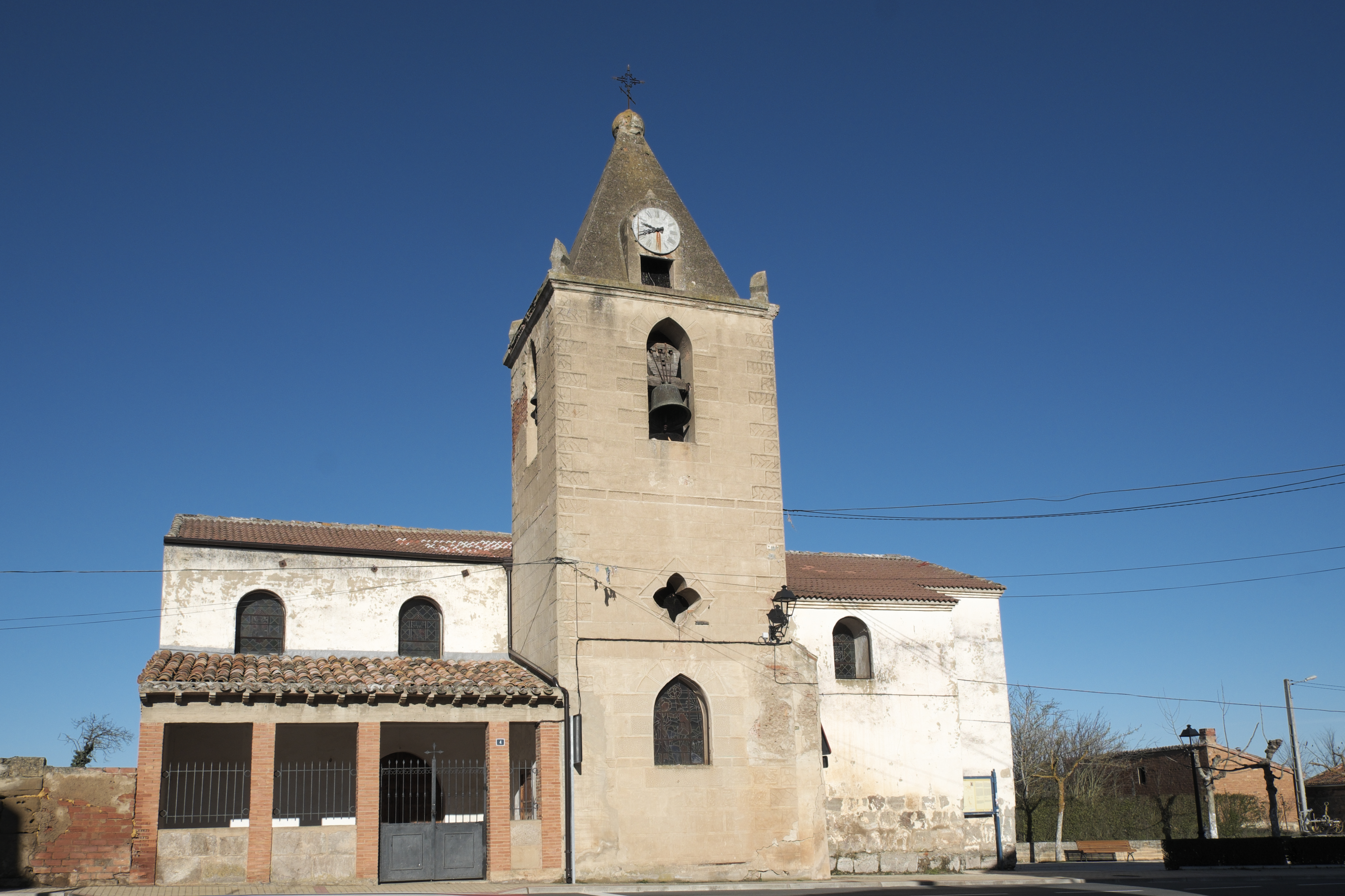 Katholische Pfarrkirche San Andrés in Cirueña in der spanischen autonomen Gemeinschaft La Rioja